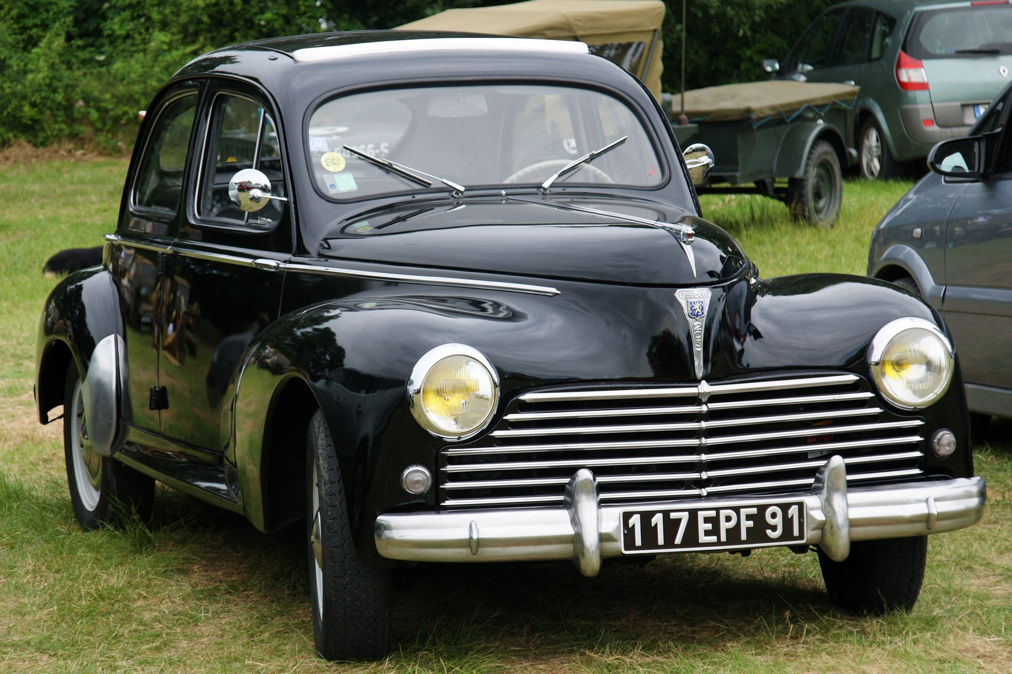 Peugeot 203 - Locomotion en fête - 2009